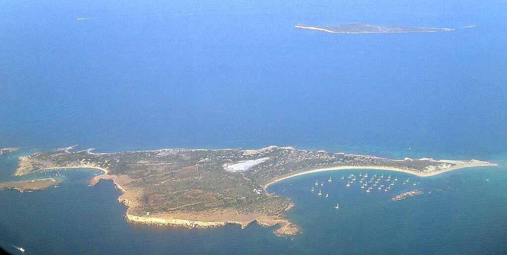 Vista aèria de s'Espalmador, i al fons s'Espardell, al nord de Formentera.